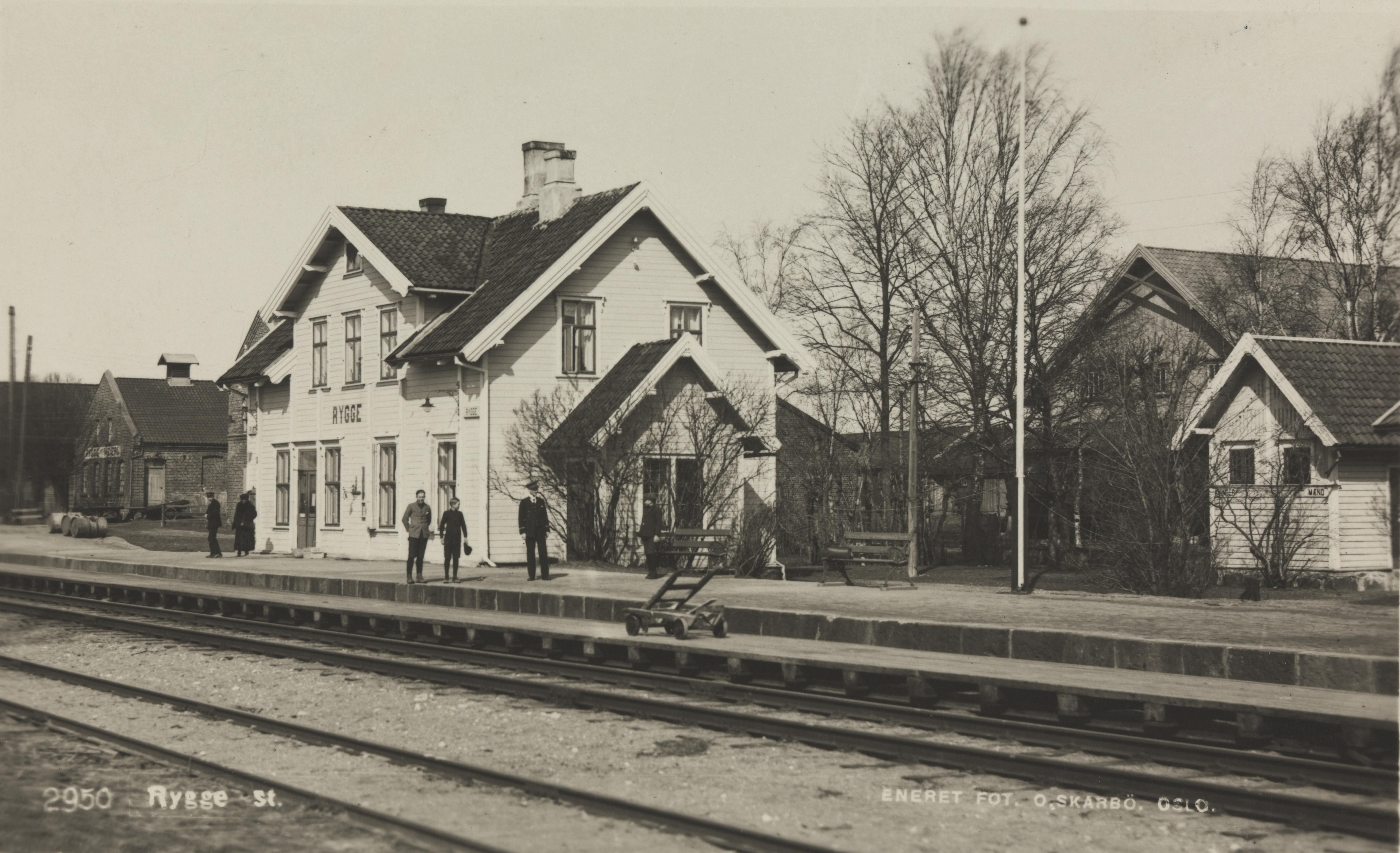 Bildet er hentet fra Nasjonalbibliotekets bildesamling Rygge, Rygge, Østfold